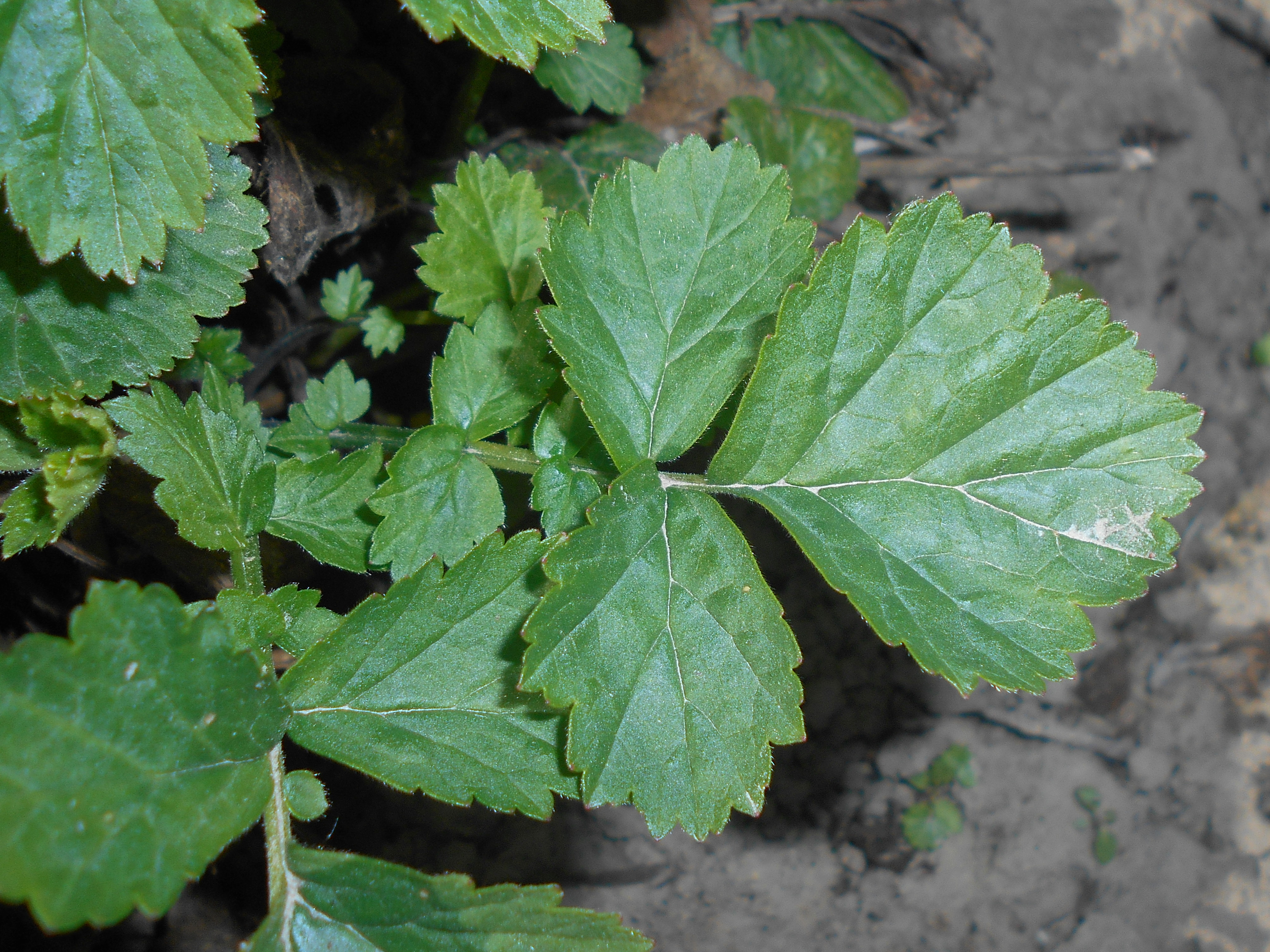 Geum magellanicum, Ogród Botaniczny UMCS w Lublinie.